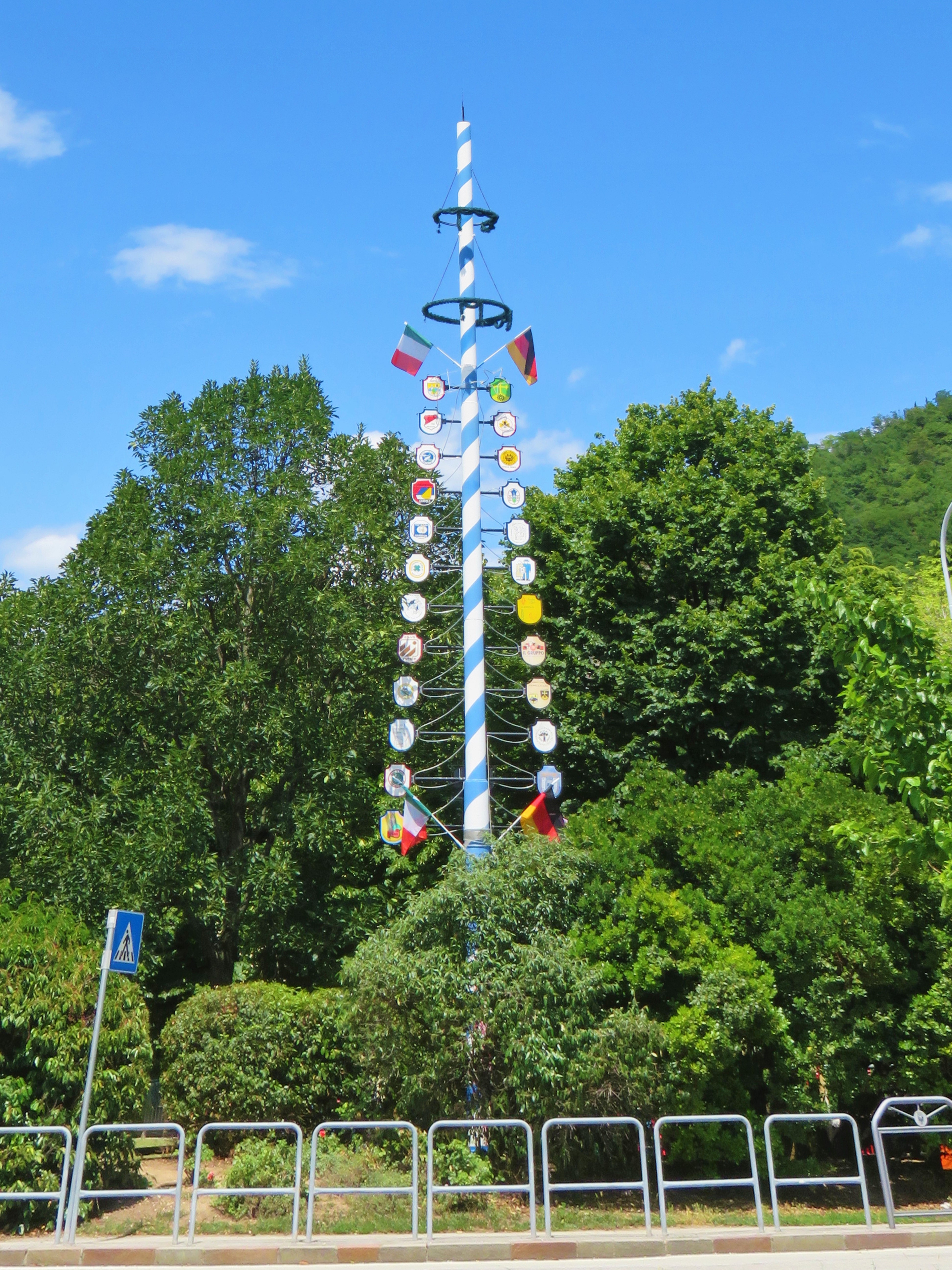 Maibaum di Gardolo a testimonianza dell'amicizia tra Gardolo, in Trentino, e Neufahrn bei Freising, in Baviera, ufficializzato nel 1983 con il gemellaggio.